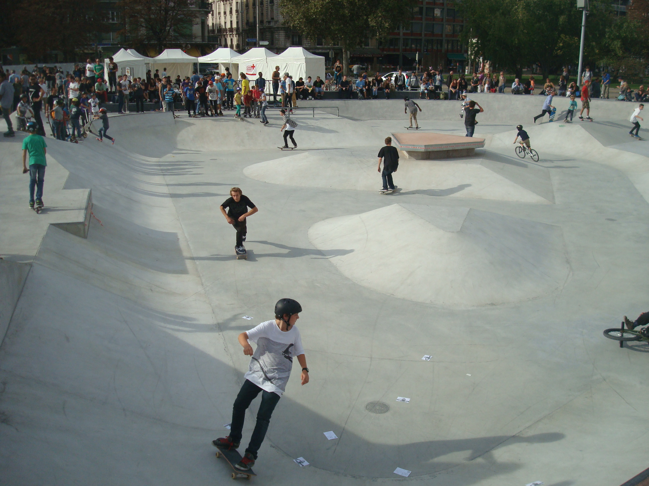 L'un des plus grand skatepark public d'Europe Inauguré le 6 octobre 2012. Contest des moins de 16 ans. Inauguration du Skatepark de Plainpalais à Genève